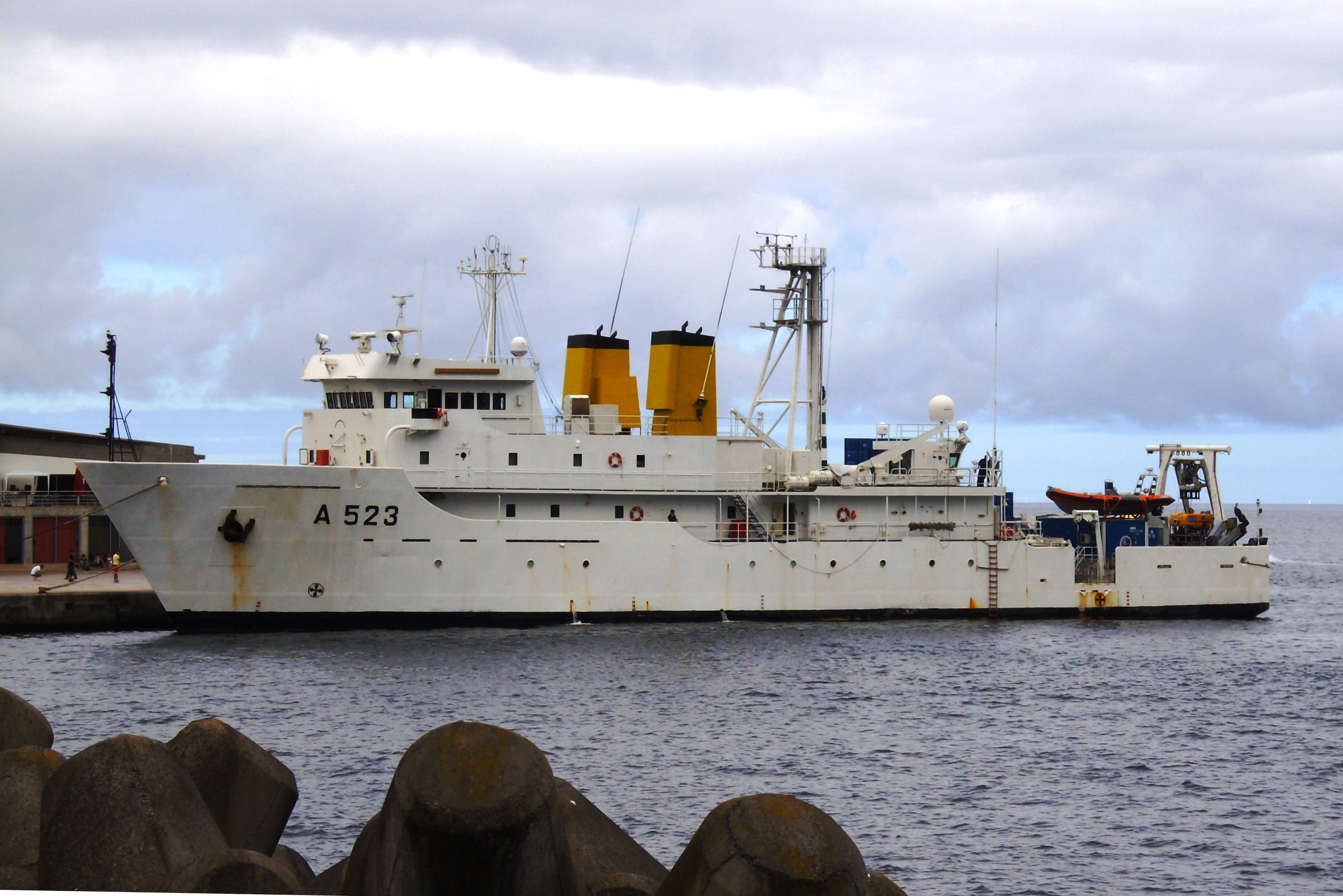 NRP Almirante Gago Coutinho (A-523) ancorado no Porto de Pipas, Angra do Heroísmo, ilha Terceira, Açores.